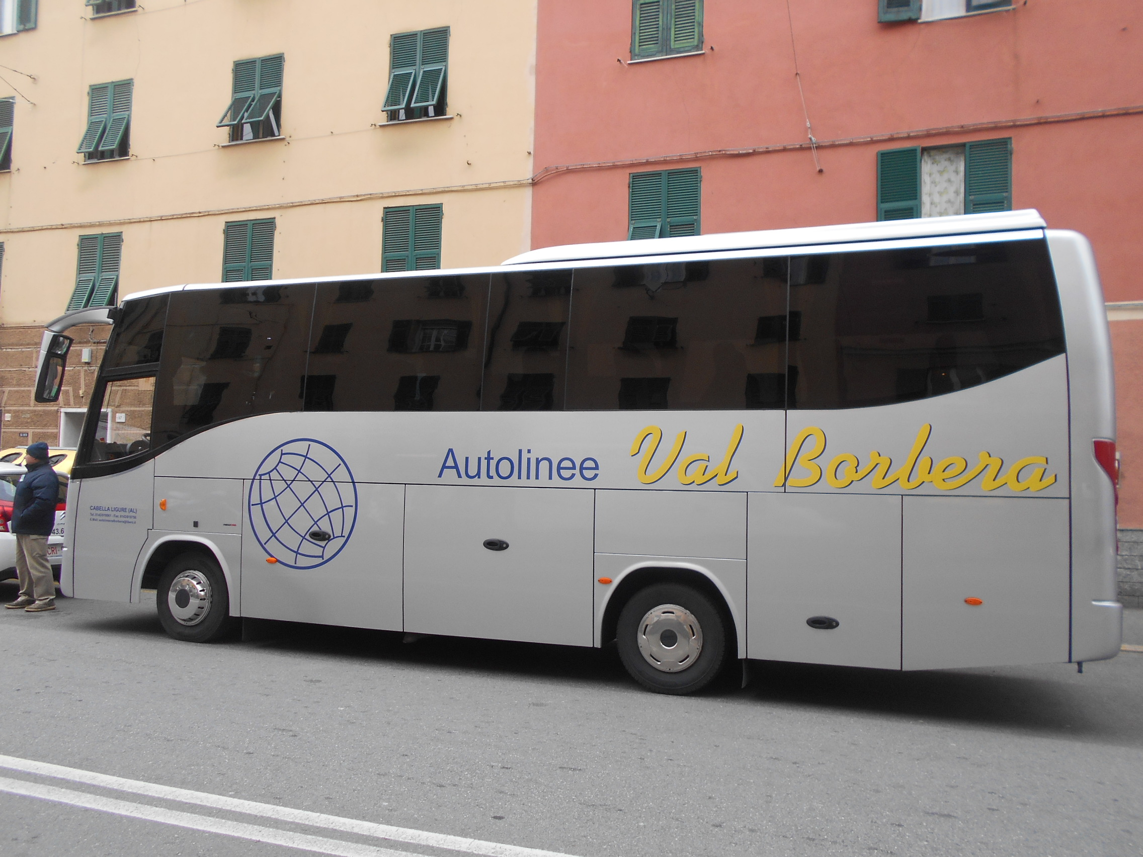 Minibus Autolinee Val Borbera a Genova